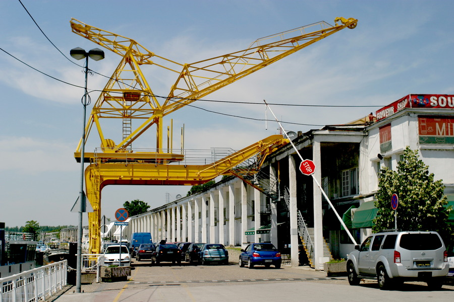 Srpski (latinica): Beton hala